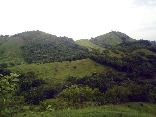 Cerro la mona y Cerro grande, Villa Lourdes, Los Santos